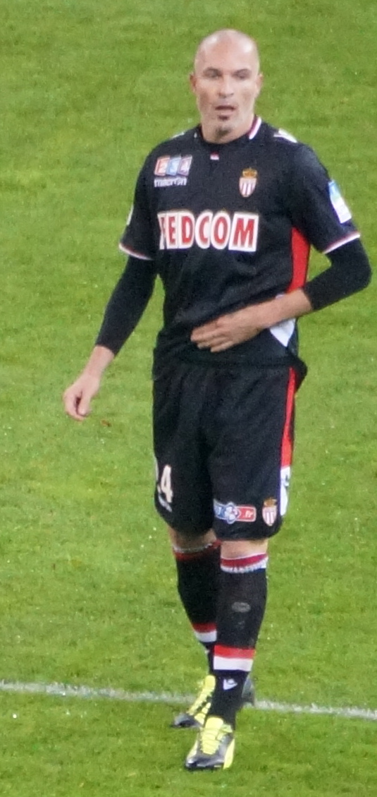 Joueur de foot en pleine action.